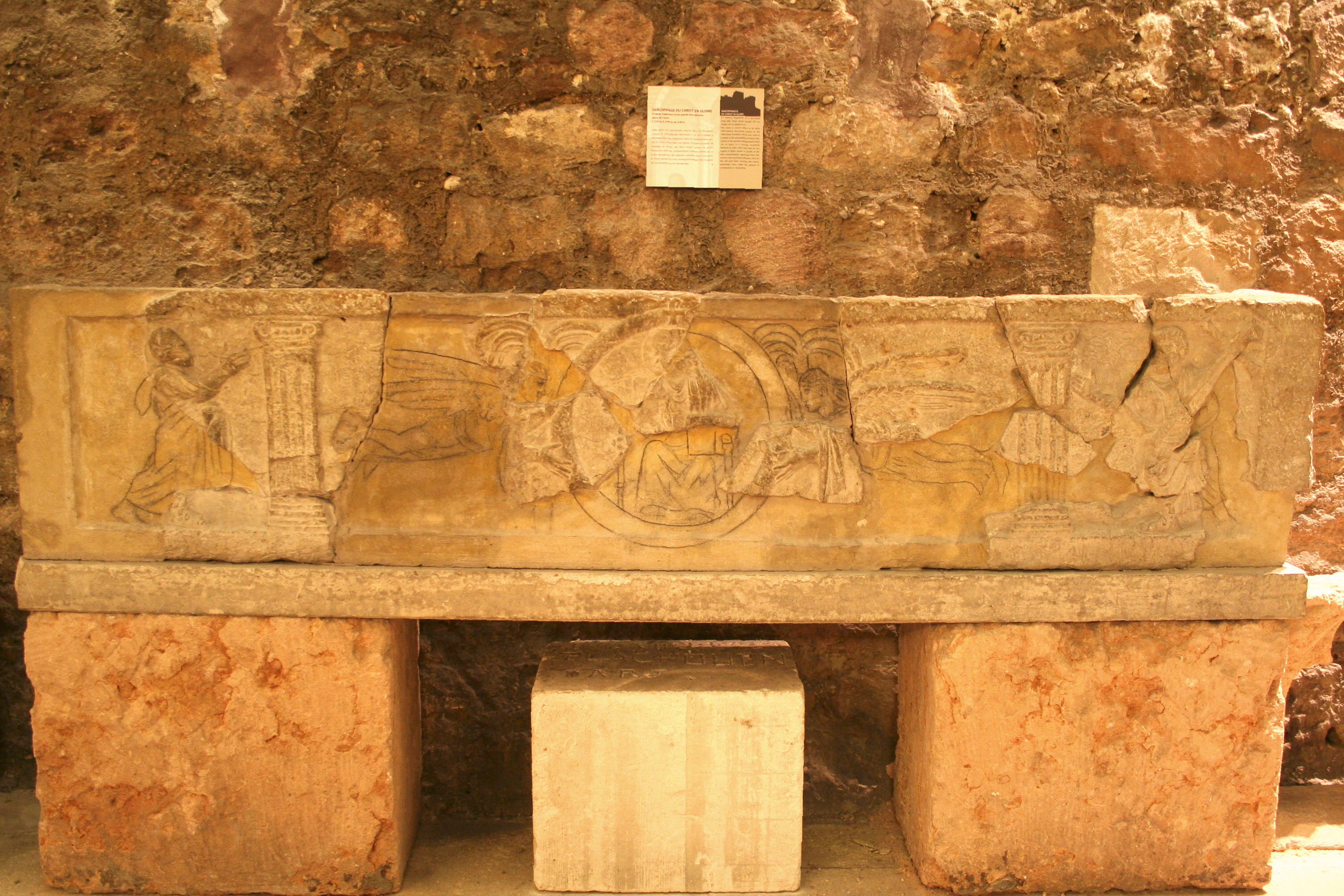 Sarcophage du milieu du Ve siècle représentant le Christ tronant se trouvant dans les cryptes de l'abbaye de Saint-Victor à Marseille.